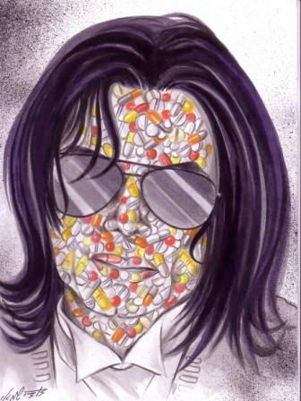 ללא תיאור